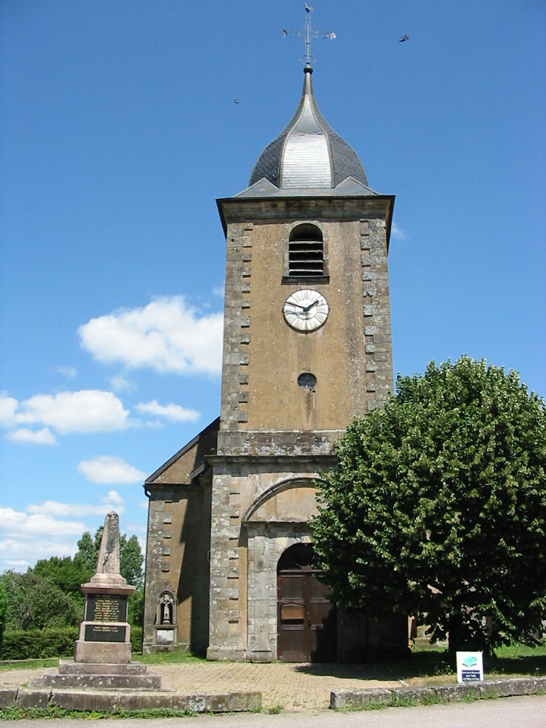 Viménil Église Saint-Jacques-le-Majeur Commune du canton de Bruyères (Vosges) Photo personnelle du 10 juillet 2006. Copyright © Christian Amet